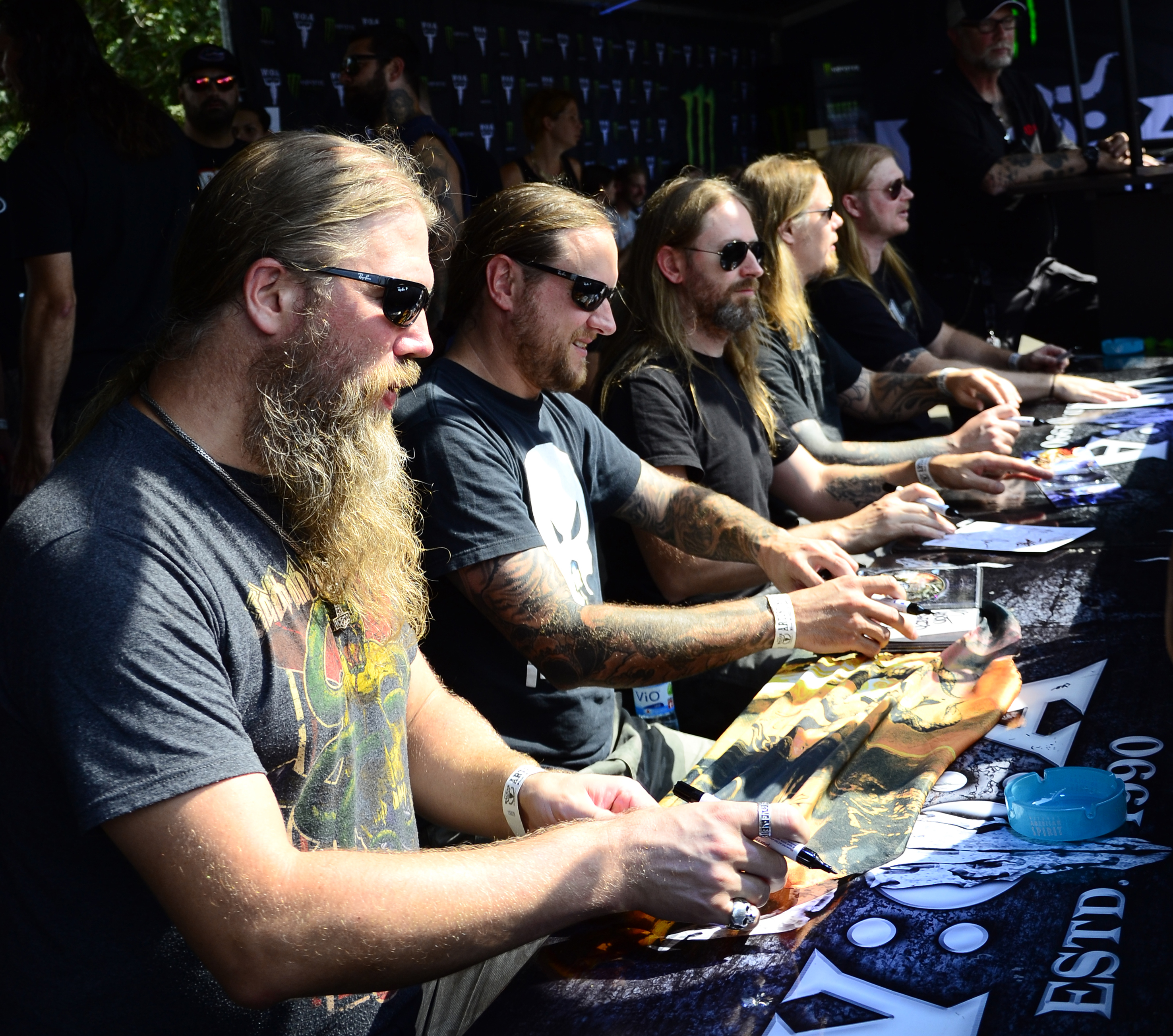 Amon Amarth beim Meet & Greed auf dem Wacken Open Air 2014